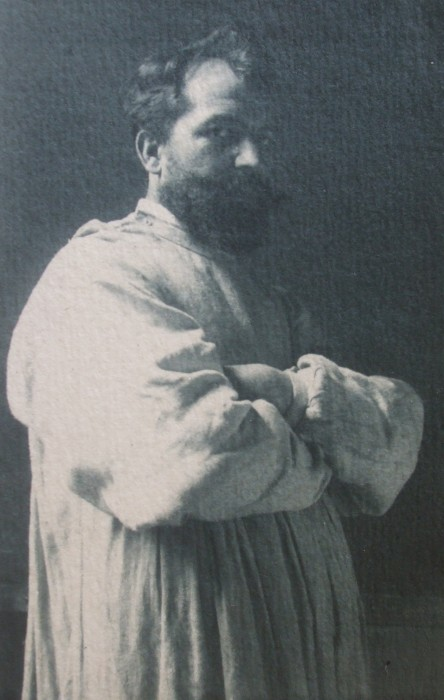 Vilém Amort, český sochař